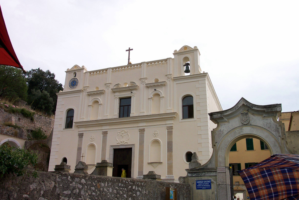 Church, Gaeta, Lazio, Italy - santuario Santa Trinità